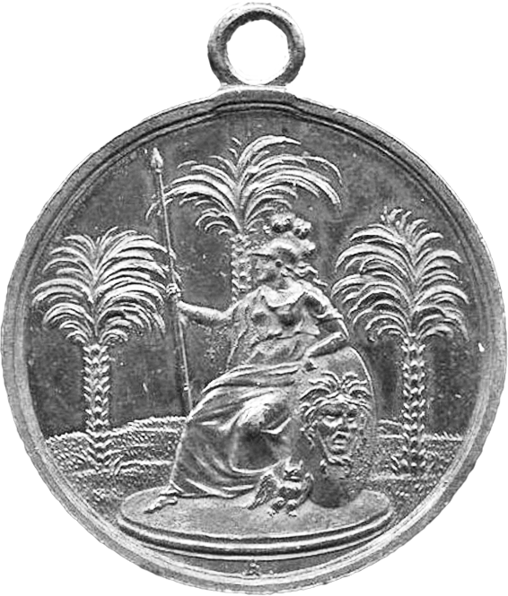 Medaille (Bijou) von 1766 der Freimaurerloge Minerva zu den drei Palmen in Leipzig, Vorderseite, ohne Seidenband (Silber, ⌀ 33 mm)